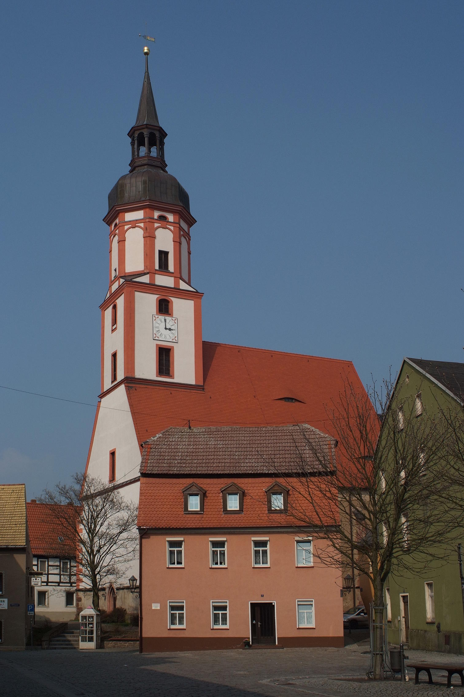 Kirche St. Johannis in Mügeln